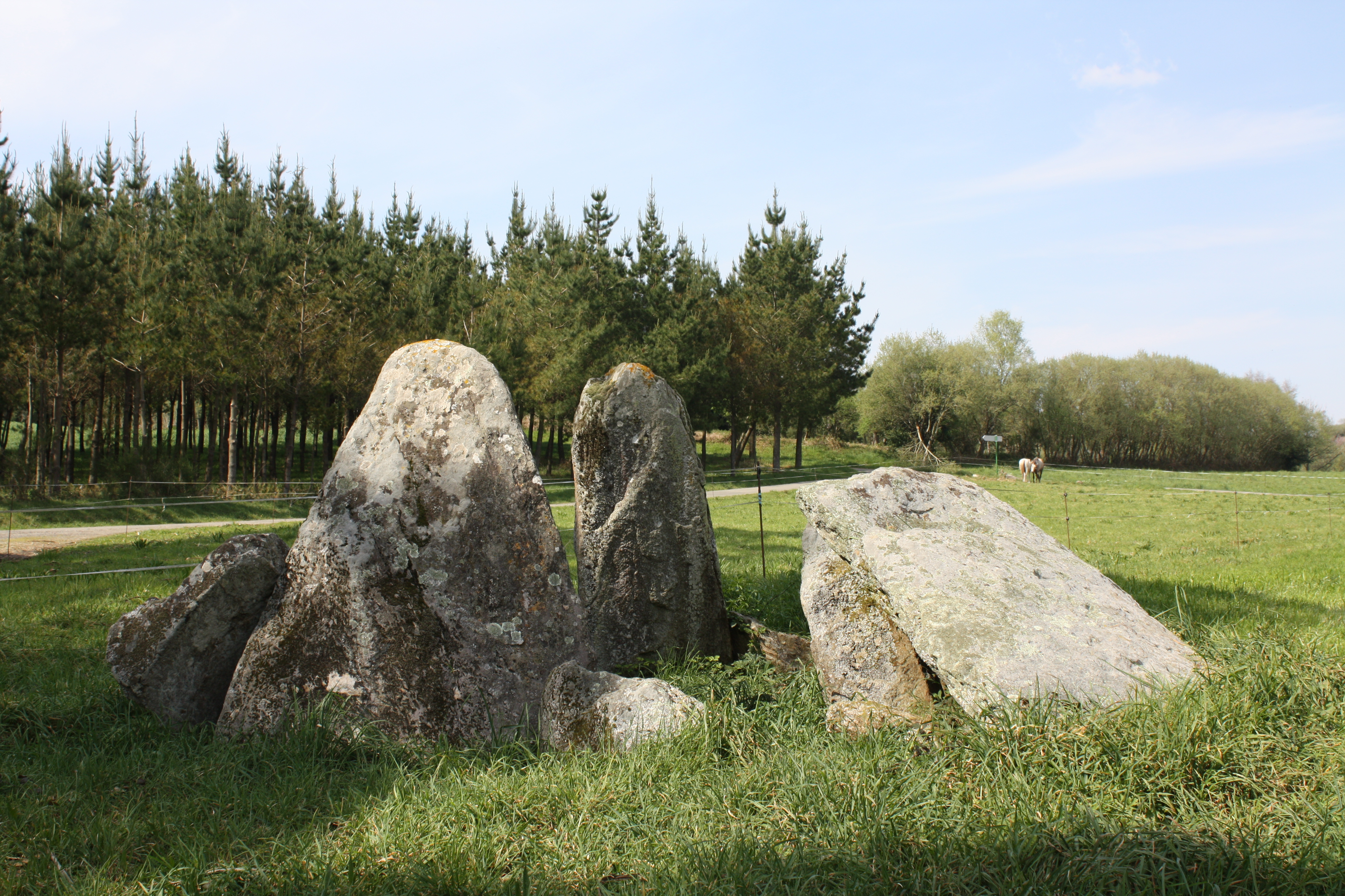 Dolmen da Pedra Moura, en Aldemunde (Carballo, A Coruña)